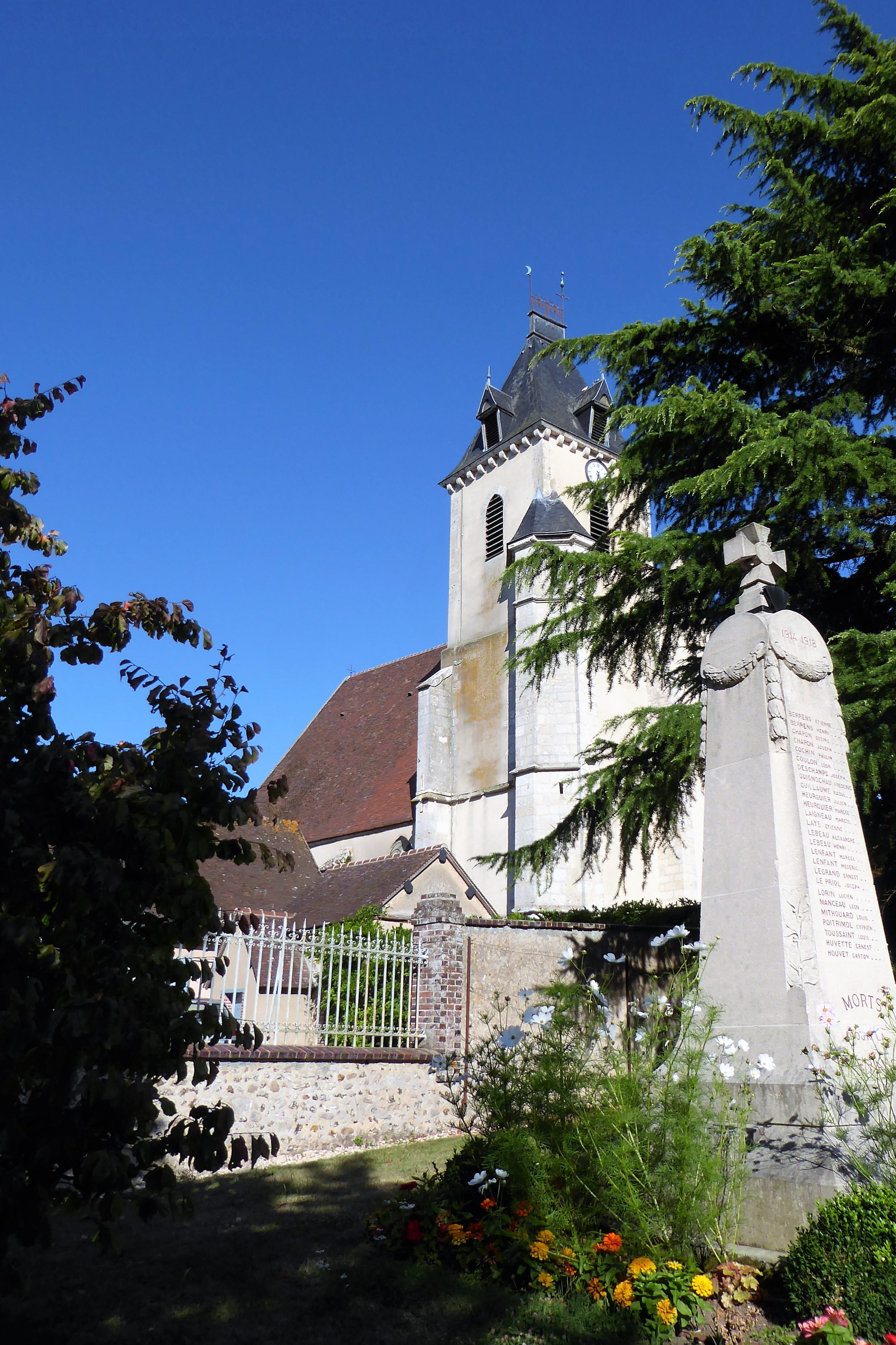 église Saint-Hilaire et monument aux morts, Thivars, Eure-et-Loir (France).